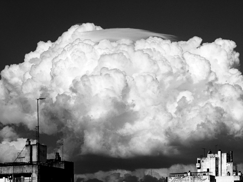 Nube pileus sobre una cúmulus